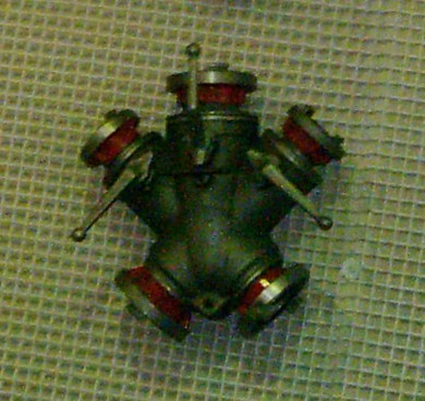 2B C-B-C Verteiler aus DDR-Produktion. Die Einspeisung des Verteilers kann hier von zwei verschiedenen Pumpen übernommen werden, um ein Löschangriff ohne Druckverlust durchführen zu können.